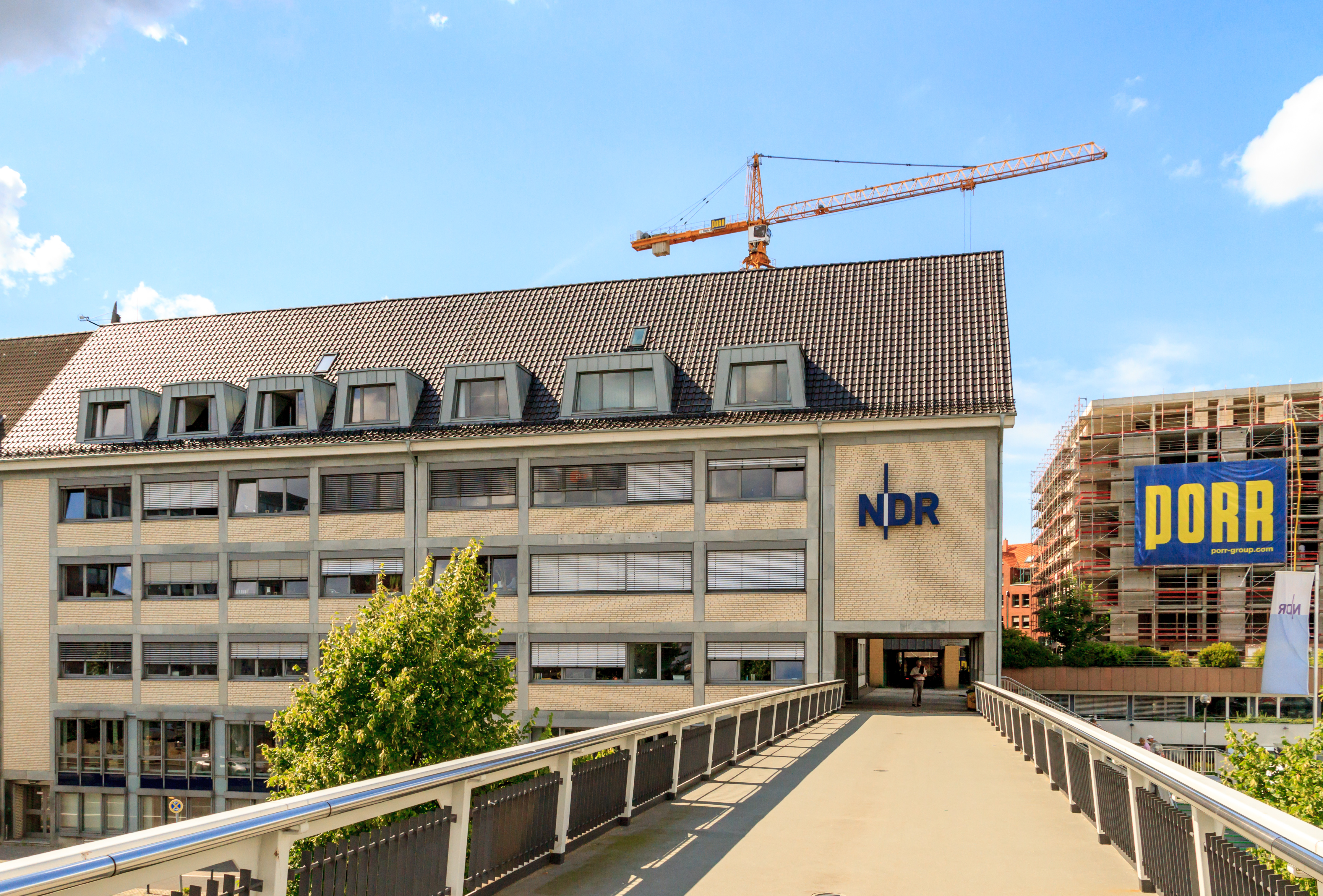 Das NDR Landesfunkhaus Schleswig-Holstein